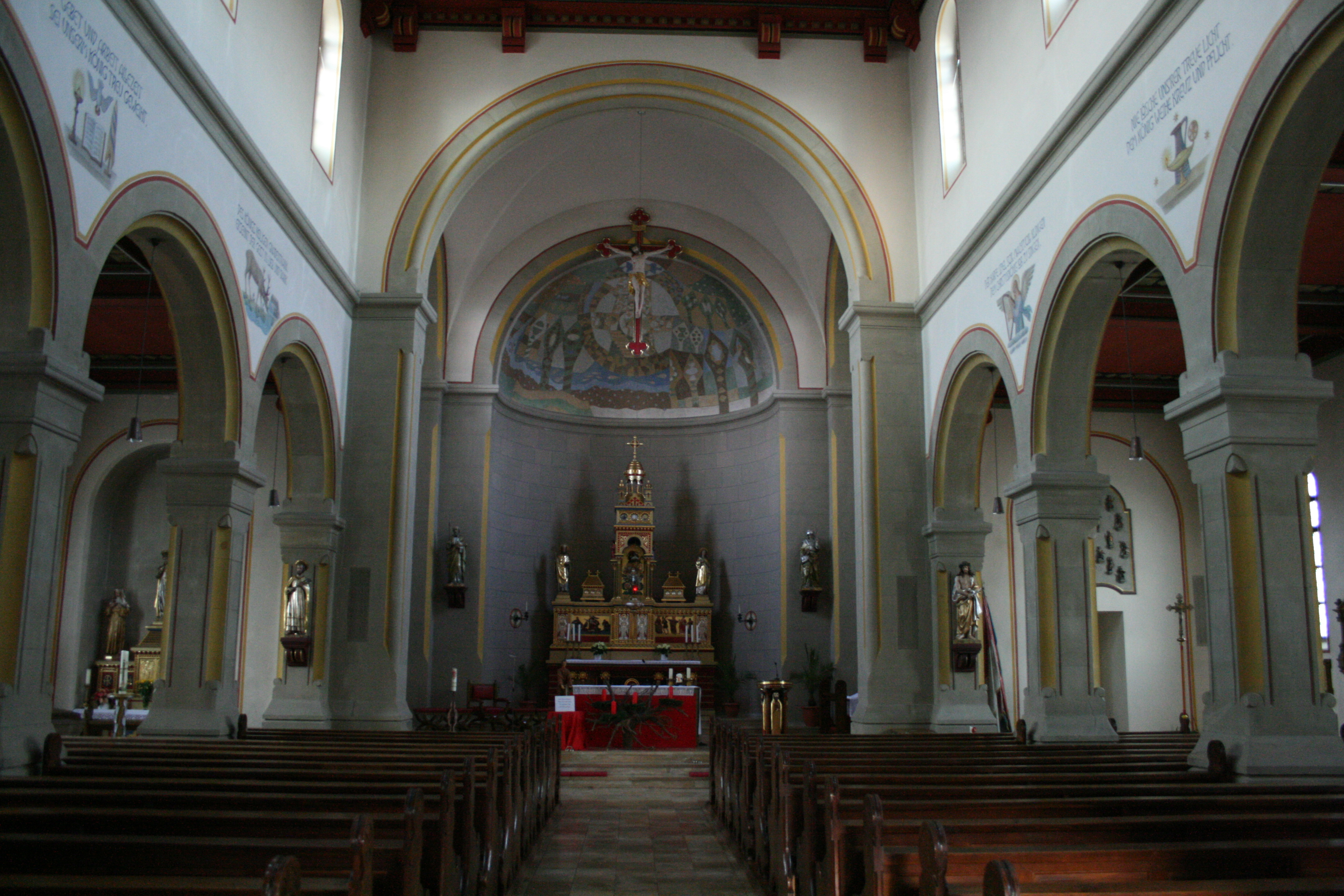 Innenraum der katholischen Kirche in Billigheim-Waldmühlbach.